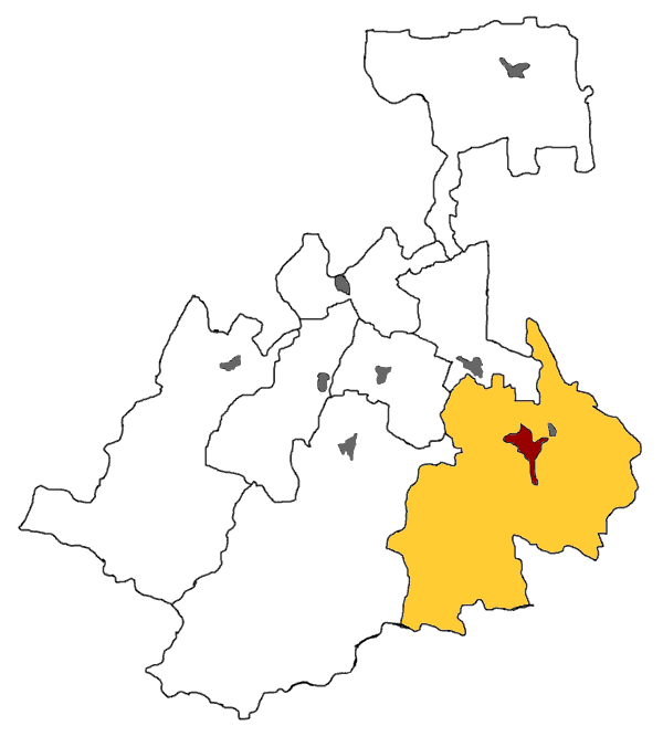 Пригородный район Северной Осетии. Красным выделен Владикавказ, тёмно-серым — райцентры. Ирон: Цæгат Ирыстоны Горæтгæрон район.